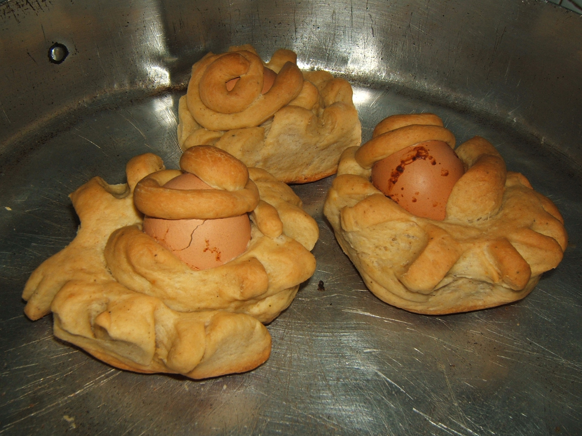 alimento pasquale salentino. un uovo sodo con un impasto aromatico intorno. Sono anche chiamati puddhricastri